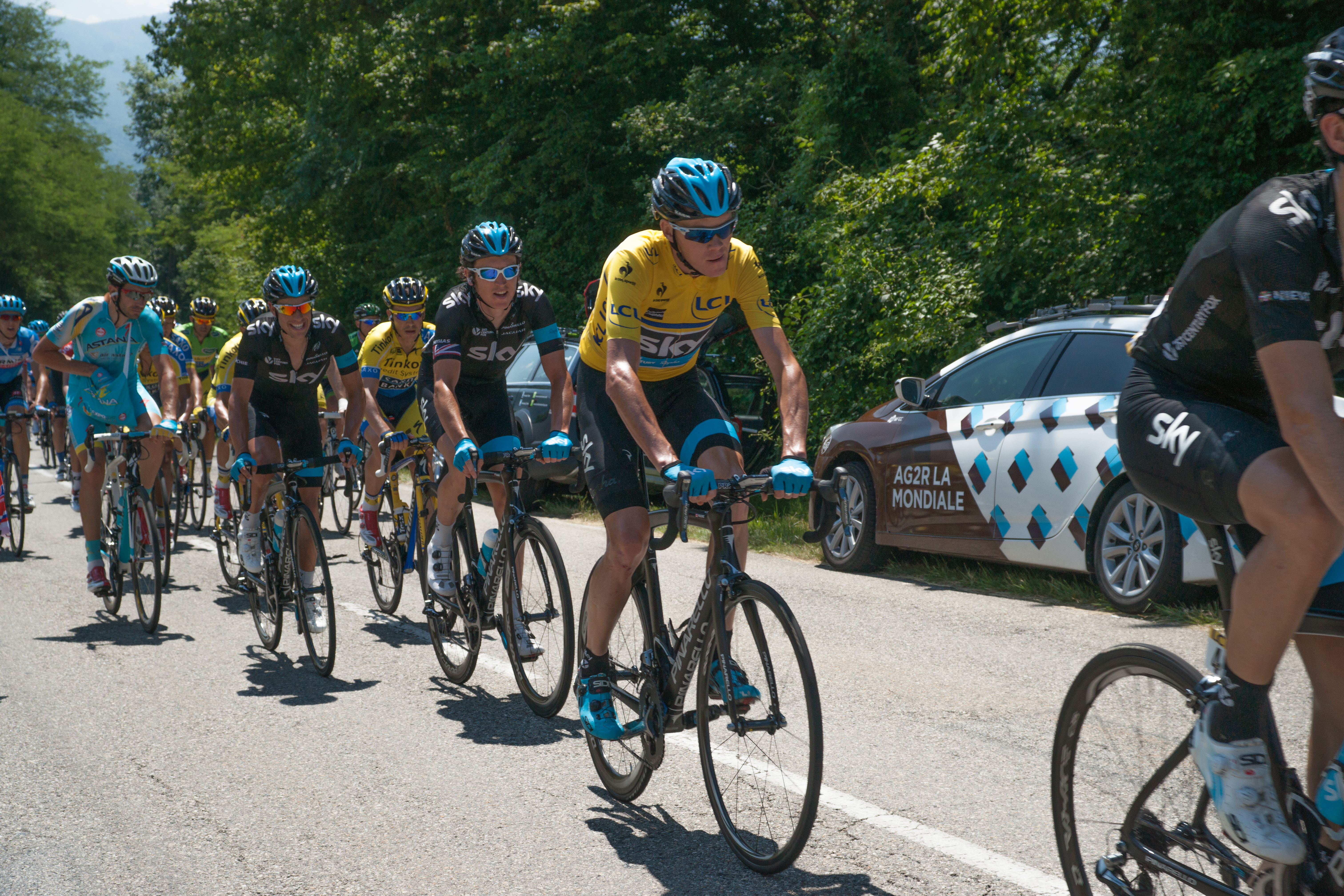 Critérium du Dauphiné 2014 - Etape 6 - Christopher Froome